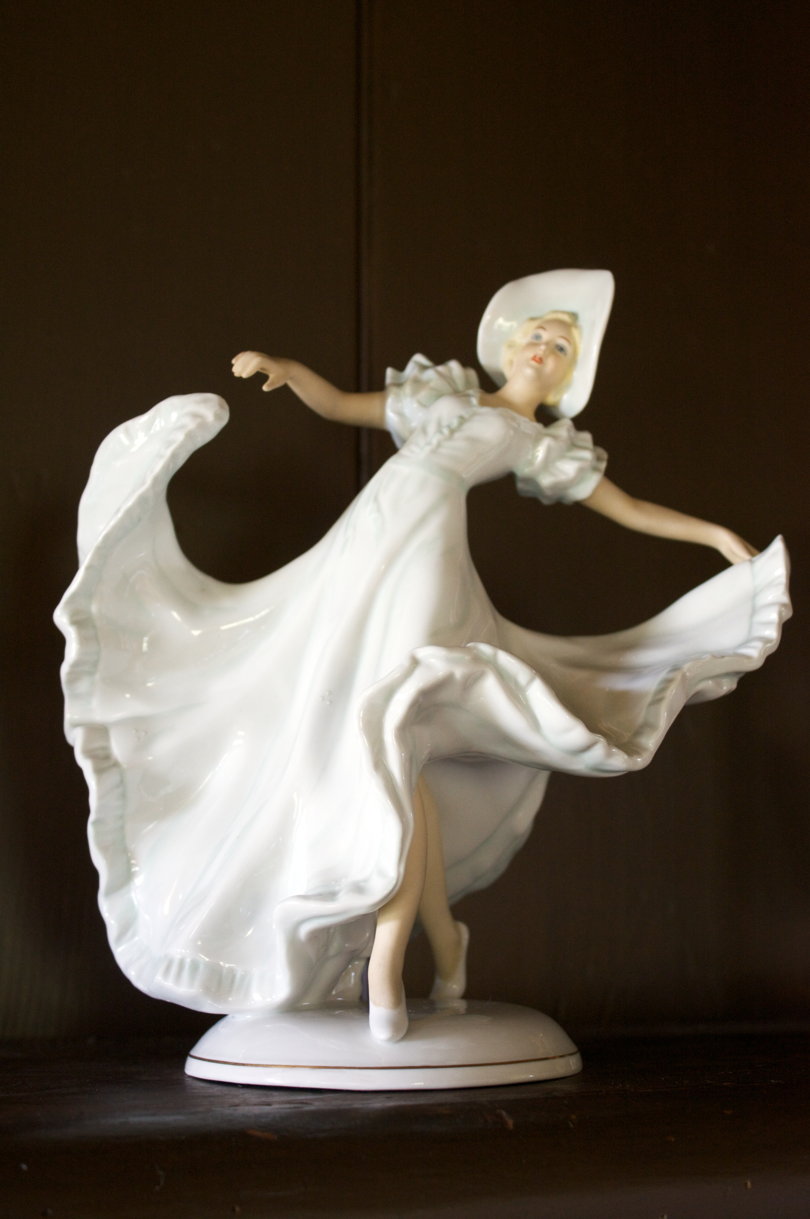 Mantlepiece figurine Royal Doulton